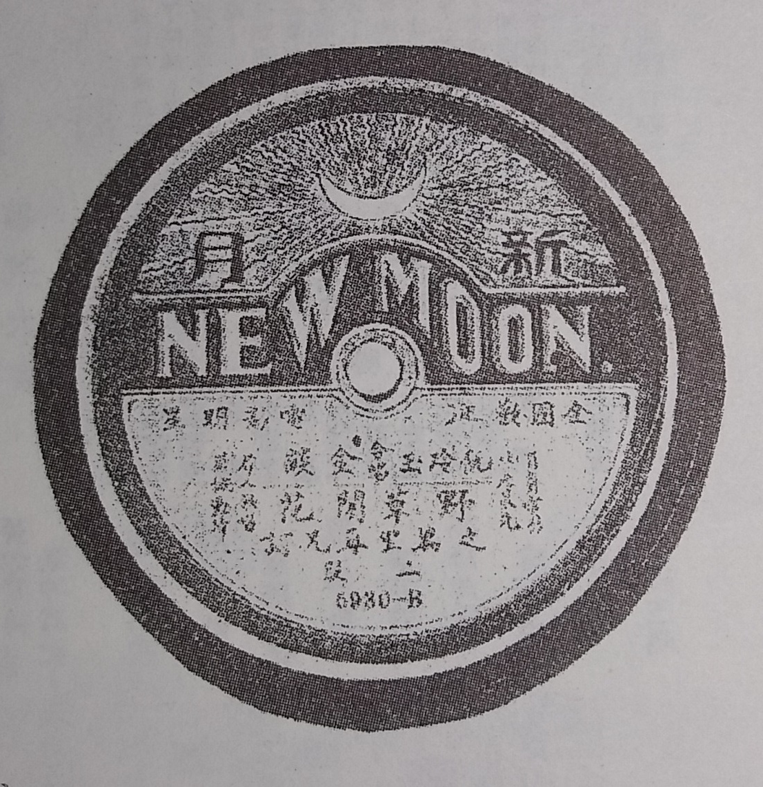 1930年金焰和阮玲玉共同演唱的《野草闲花》电影插曲《万里寻兄词》唱片